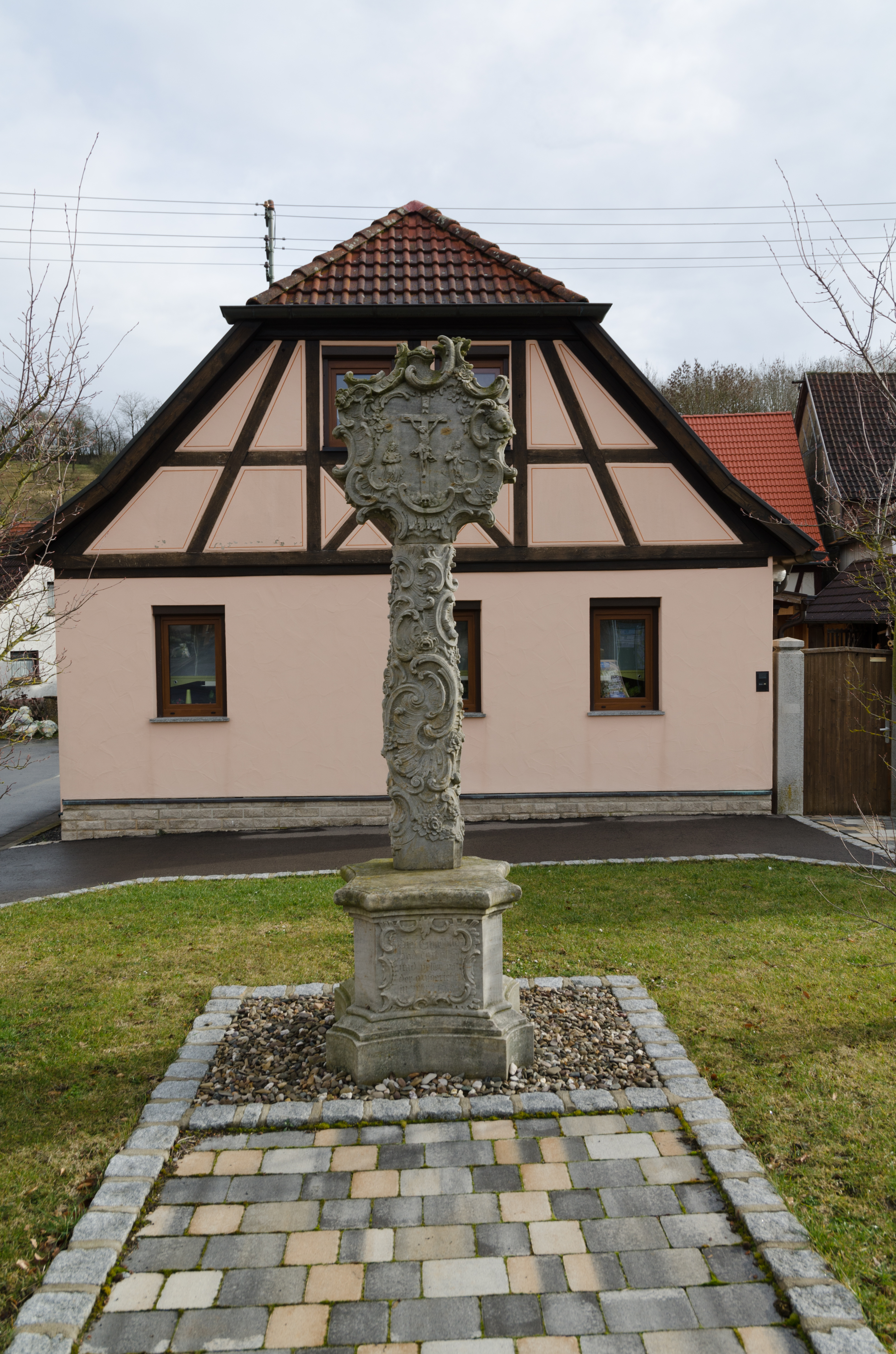 Bad Königshofen im Grabfeld, Gaboldshausen, Torweg, Bildstock